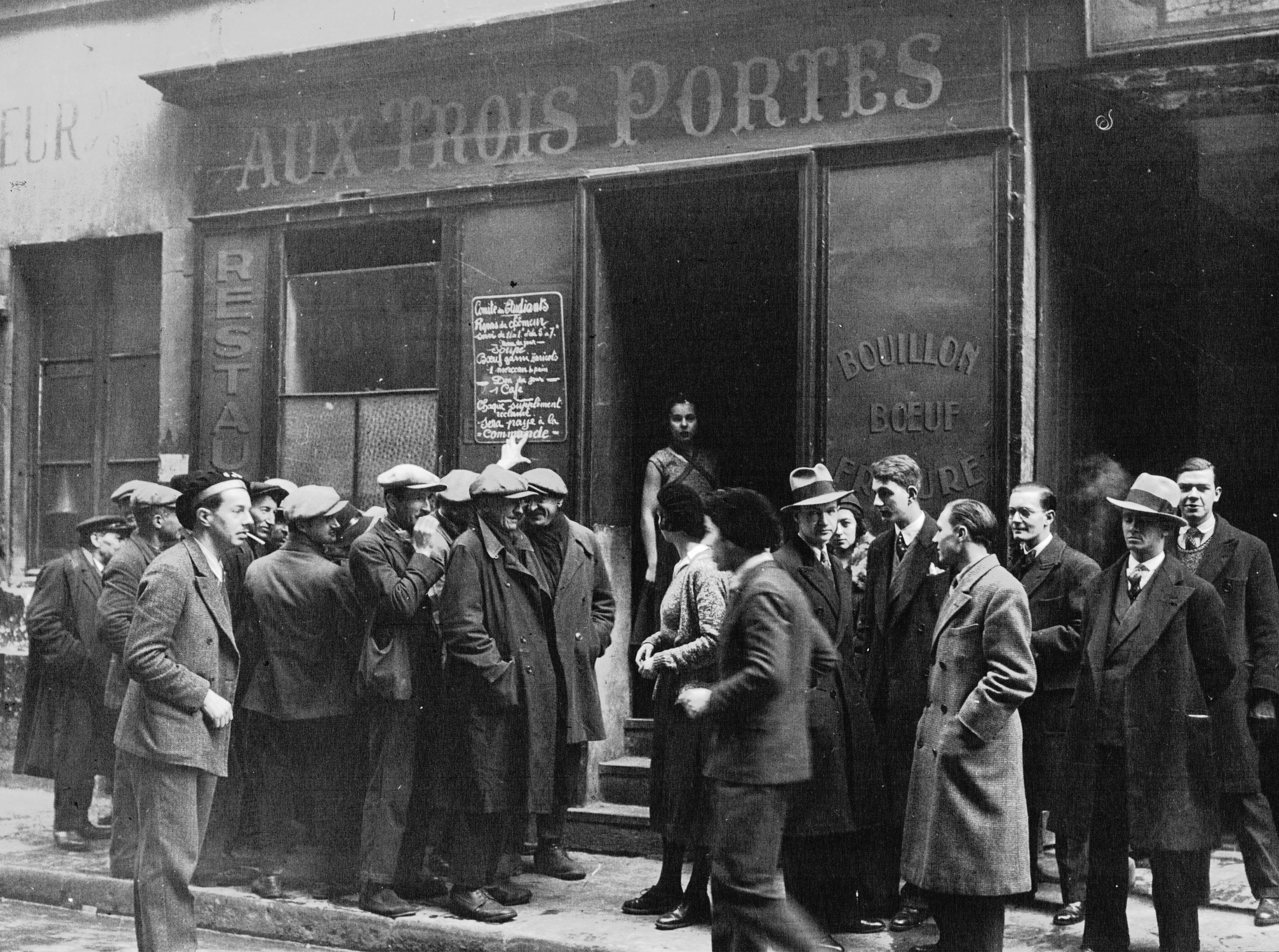 La soupe populaire offerte aux chômeurs par les faluchards parisiens en 1932.